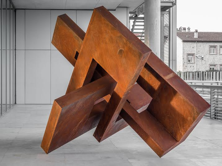 Obra de Arturo Berned. Cabeza 114